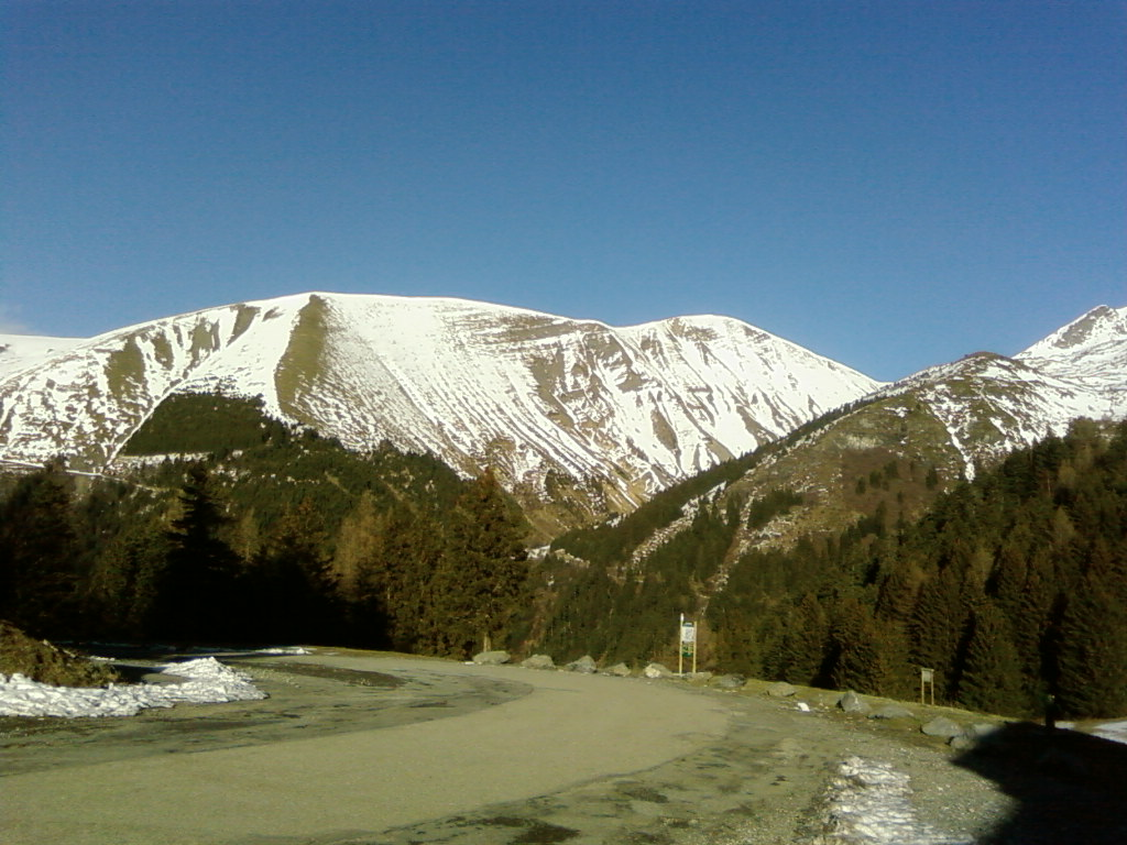 Saint-Honoré (38) : Vue de la montagne.